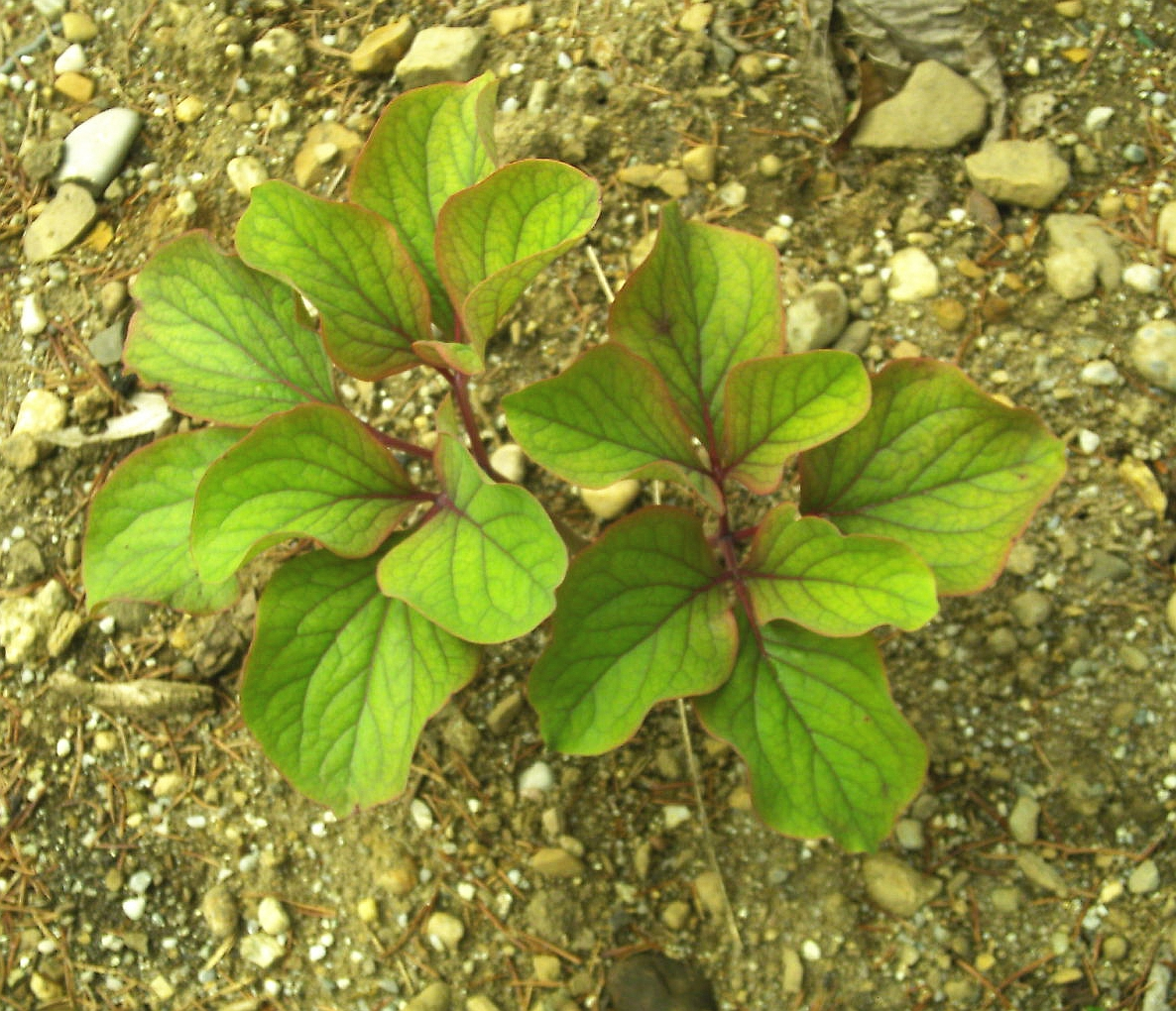 Krim Pfingstrose aus dem Orjen Species Paeonia daurica Family Paeoniaceae